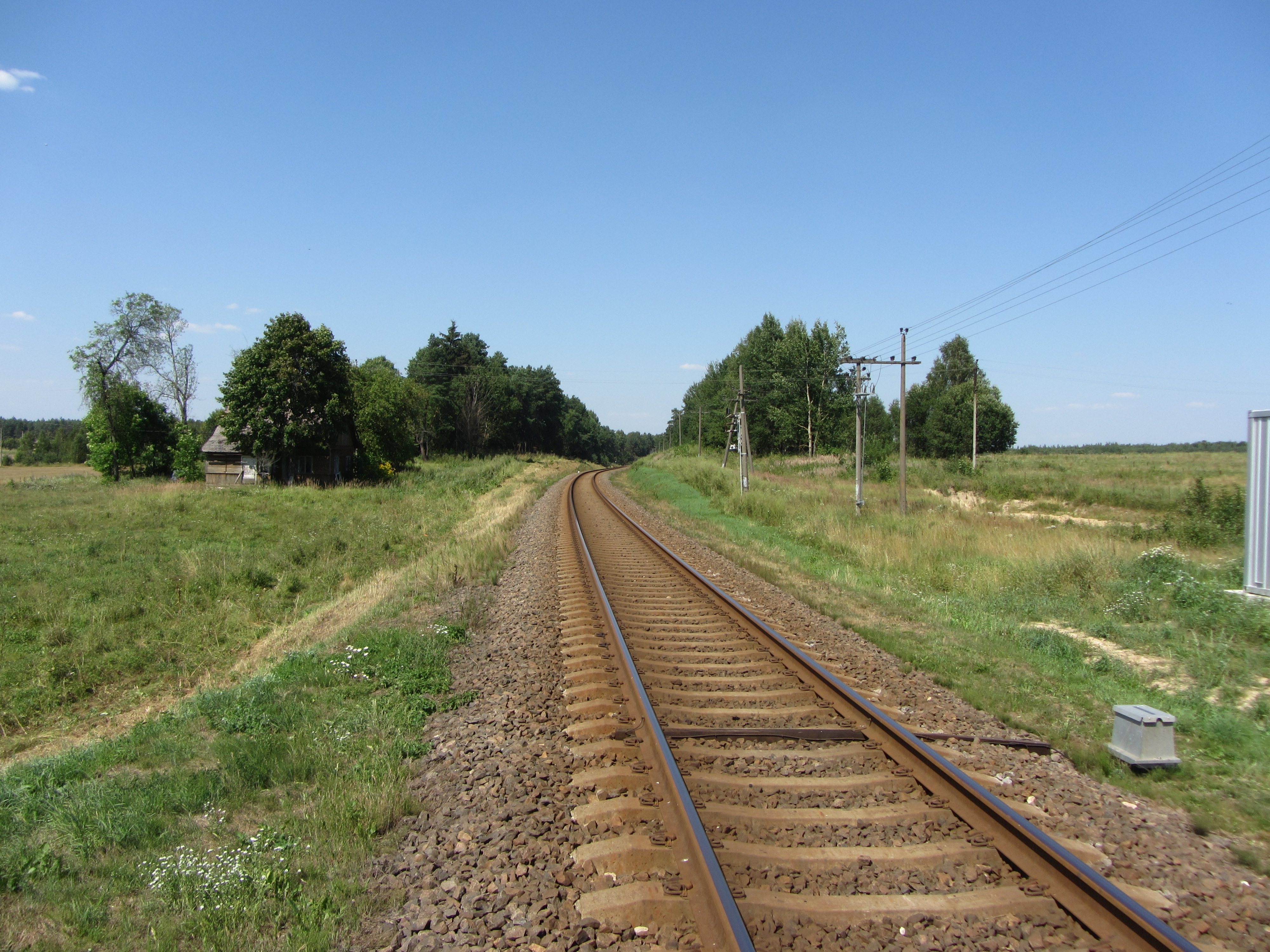 Dainava, Lithuania